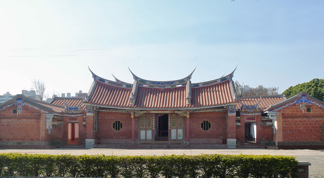 中文（台灣）: 西屯張家祖廟